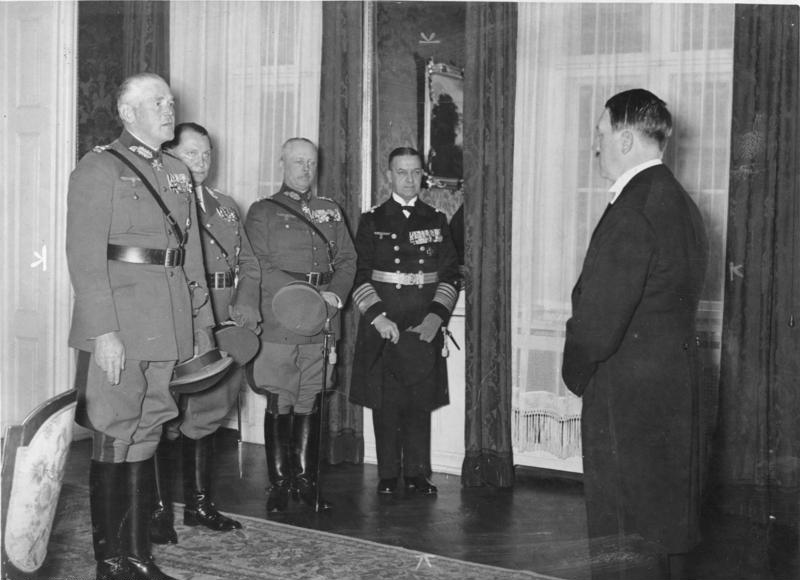 Neujahrsempfang bei Hitler Die Glückwünsche der Wehrmacht von links: Der Reichskriegsminister und Oberbefehlshaber der Wehrmacht, Generaloberst v. Blomberg, der Oberbefehlshaber der Luftwaffe, General der Flieger Göring, der Oberfehlshaber des Heeres, General der Artillerie Frhr. v. Fritsch und der Oberbefehlshaber der Kriegsmarine, Admiral Dr.h.c. Raeder. 40183-35 Abgebildete Personen: Hitler, Adolf: Reichskanzler, Deutschland Blomberg, Werner von: Generalfeldmarschall, Heer, Deutschland Göring, Hermann: Reichsmarschall, Oberbefehlshaber der Luftwaffe, Ministerpräsident von Preußen, Deutschland Raeder, Erich: Großadmiral, Oberbefehlshaber der Kriegsmarine, Deutschland (GND 118743511)